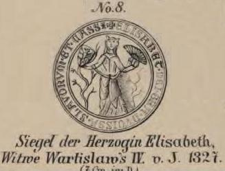 Siegel von Herzogin Elisabeth, Witwe Wartislaw IV. 1327